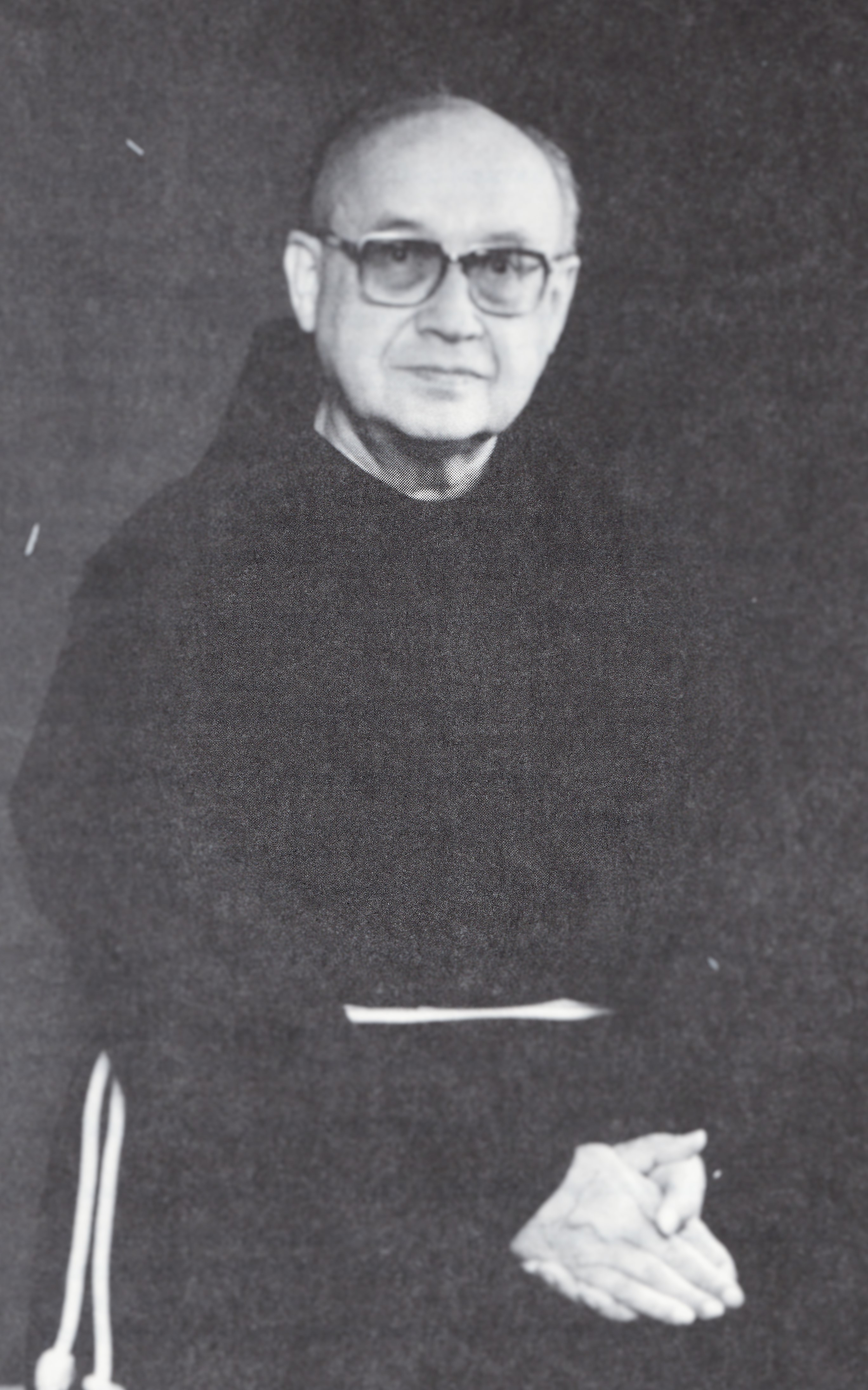 P. Dr. Lothar Hardick OFM Quelle: Dieter Berg (Hrsg.): Spiritualität und Geschichte. Festgabe für Lothar Hardick OFM zu seinem 80. Geburtstag, Werl 1993